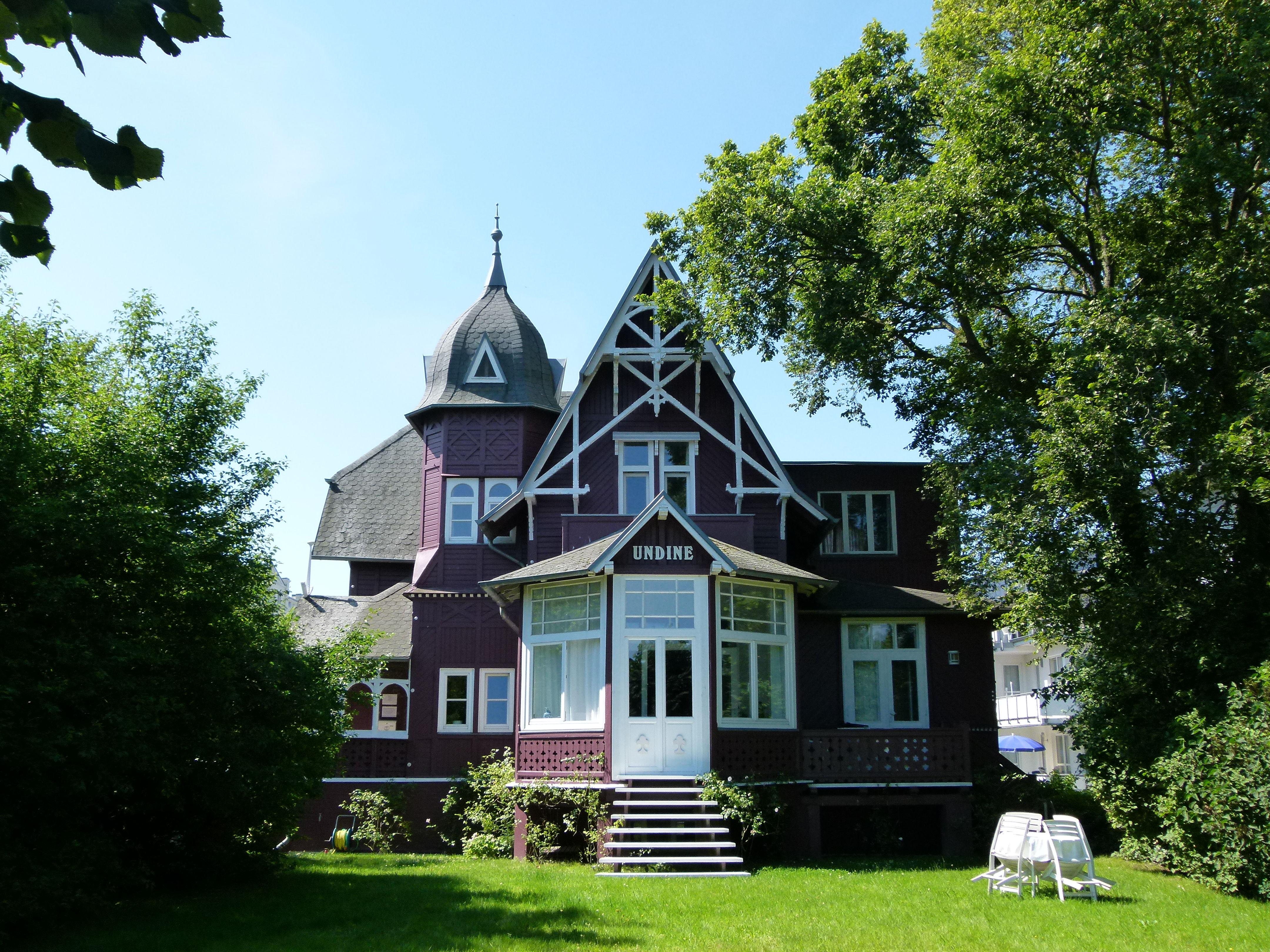 Villa Undine, Strandpromenade 30 in Binz, Insel Rügen, Mecklenburg-Vorpommern; unter Denkmalschutz